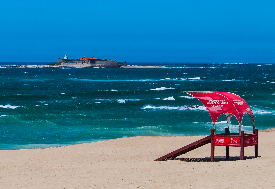 Playa_Praia_de_Moledo_Caminha